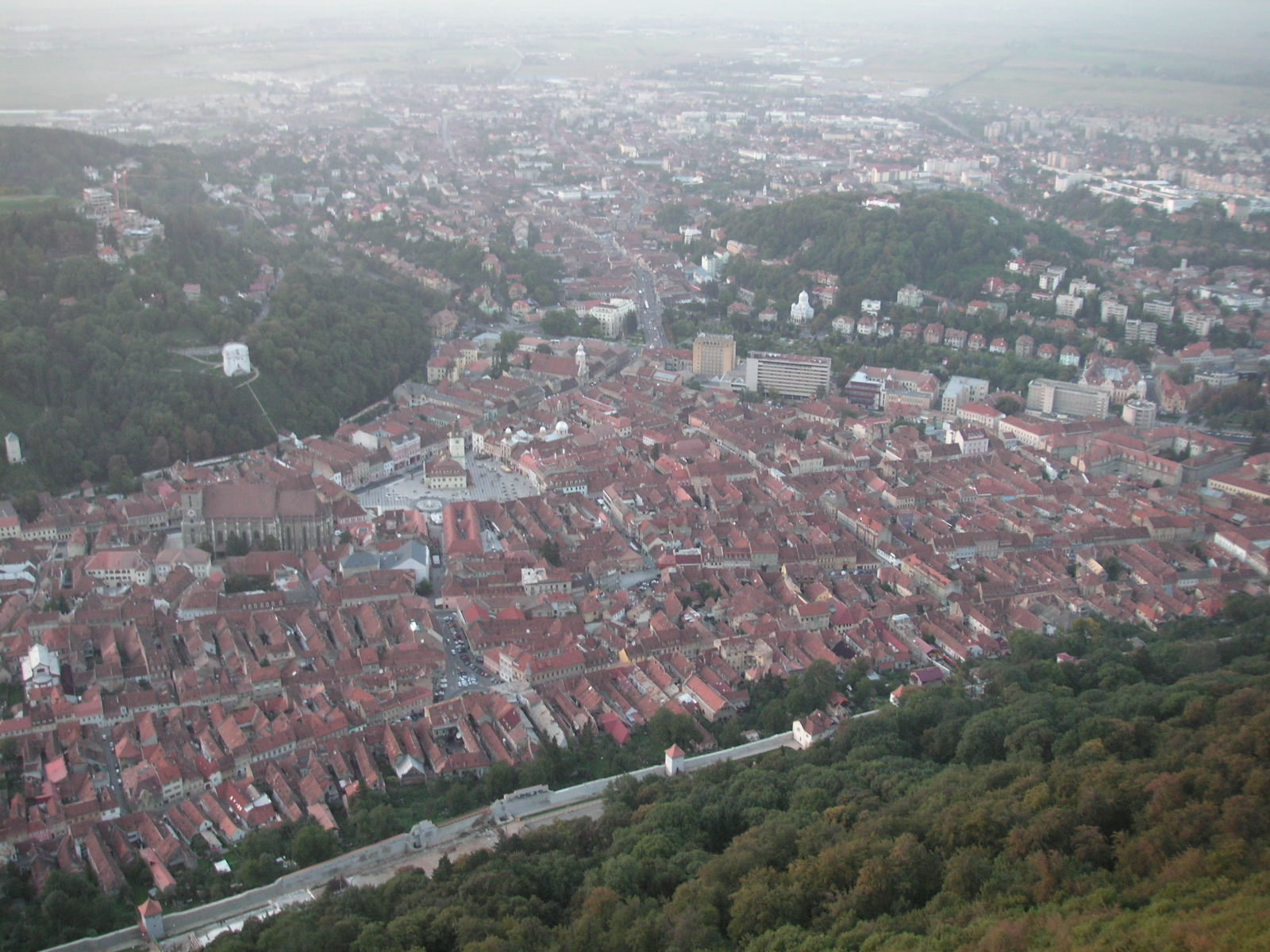 Brașov, seen from Mount Tâmpa